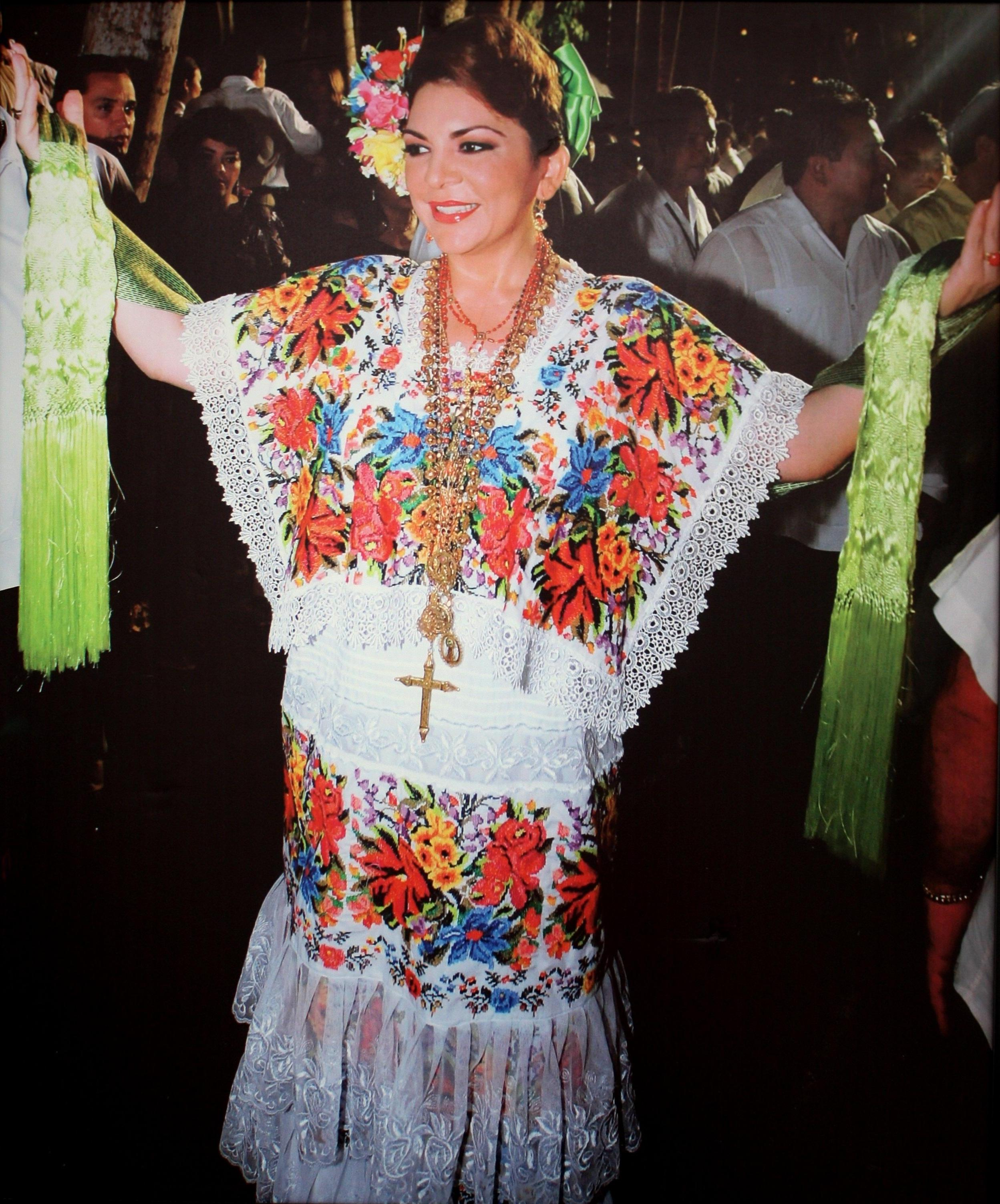 Ivonne Ortega Pacheco. Gobernadora de Yucatán 2007-2012